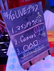 amiinaセトリボード(20150412(1))